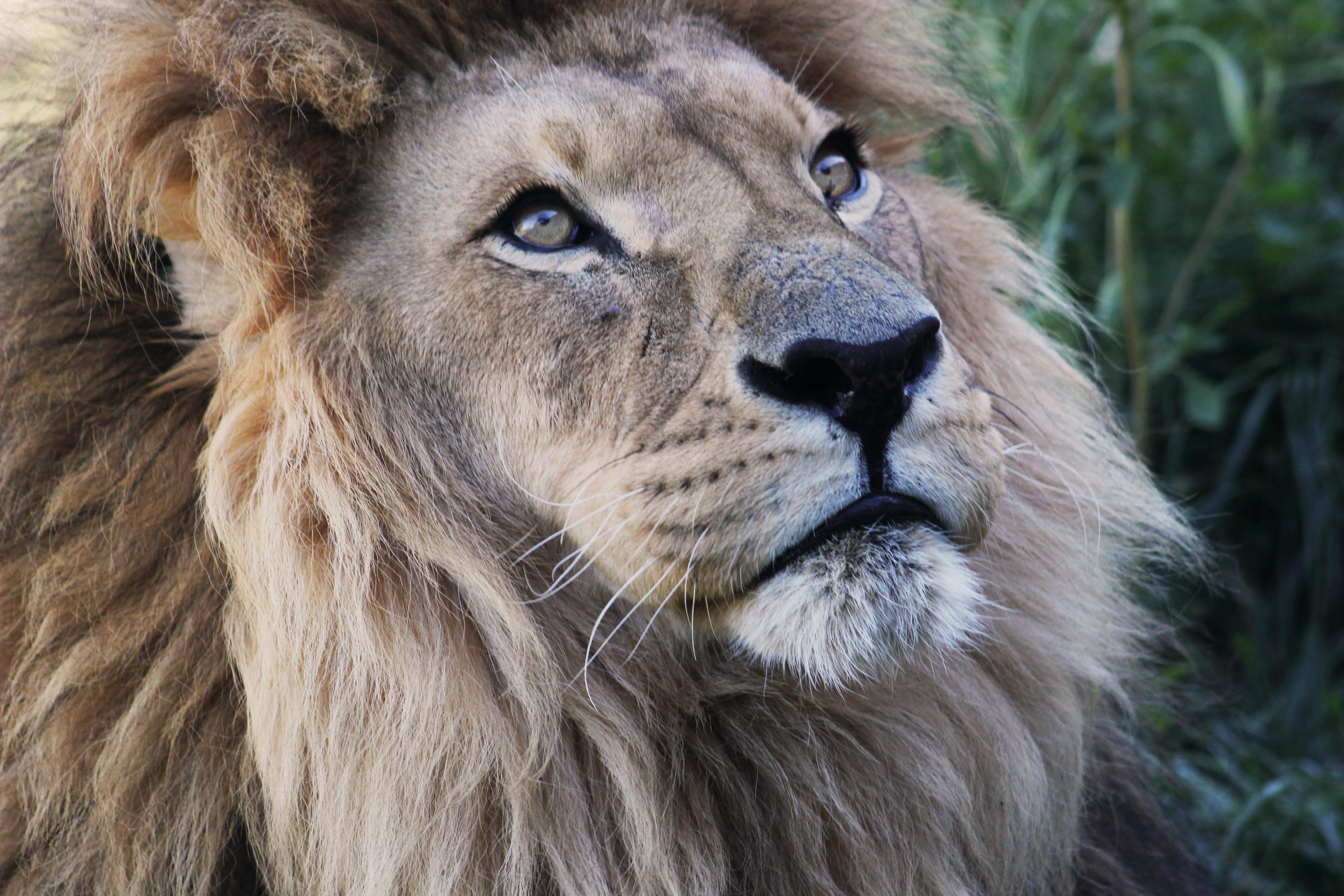 Dondon et Tsavo partagent un large enclos avec un tunnel traversant